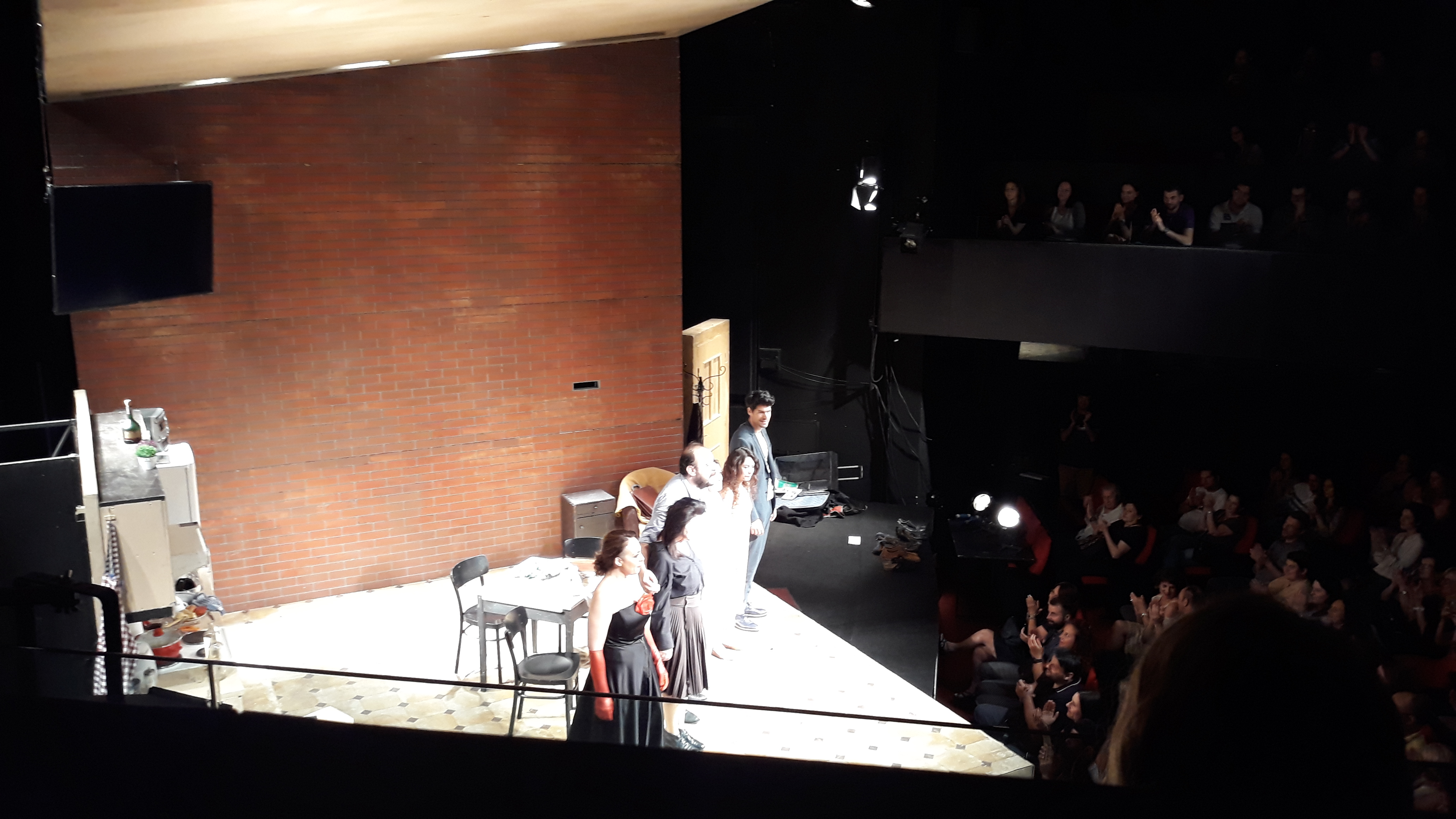 Представа Балкански шпијун у Народном позоришту у Београду